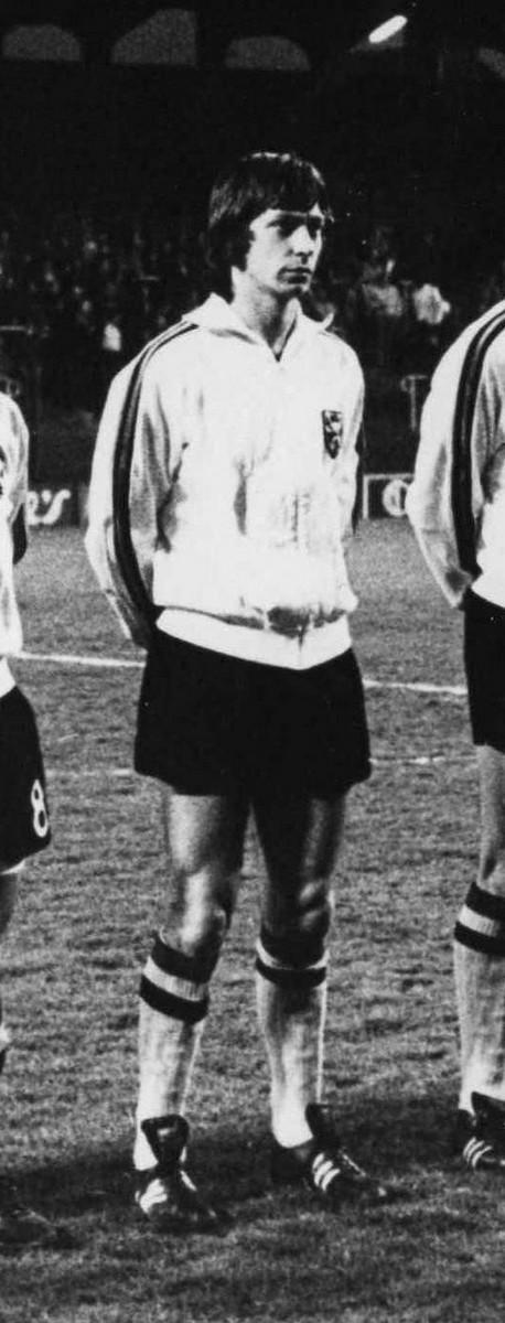 Roger Henrotay en équipe nationale belge.